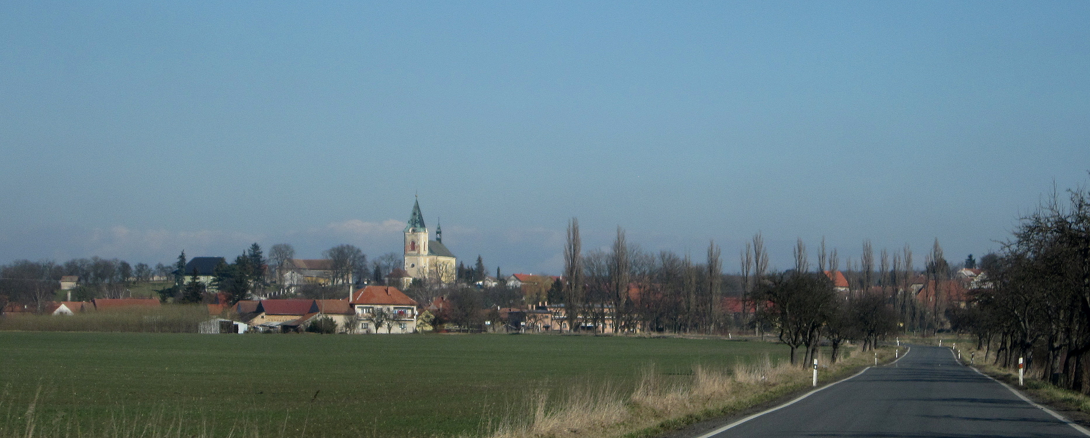 Činěves